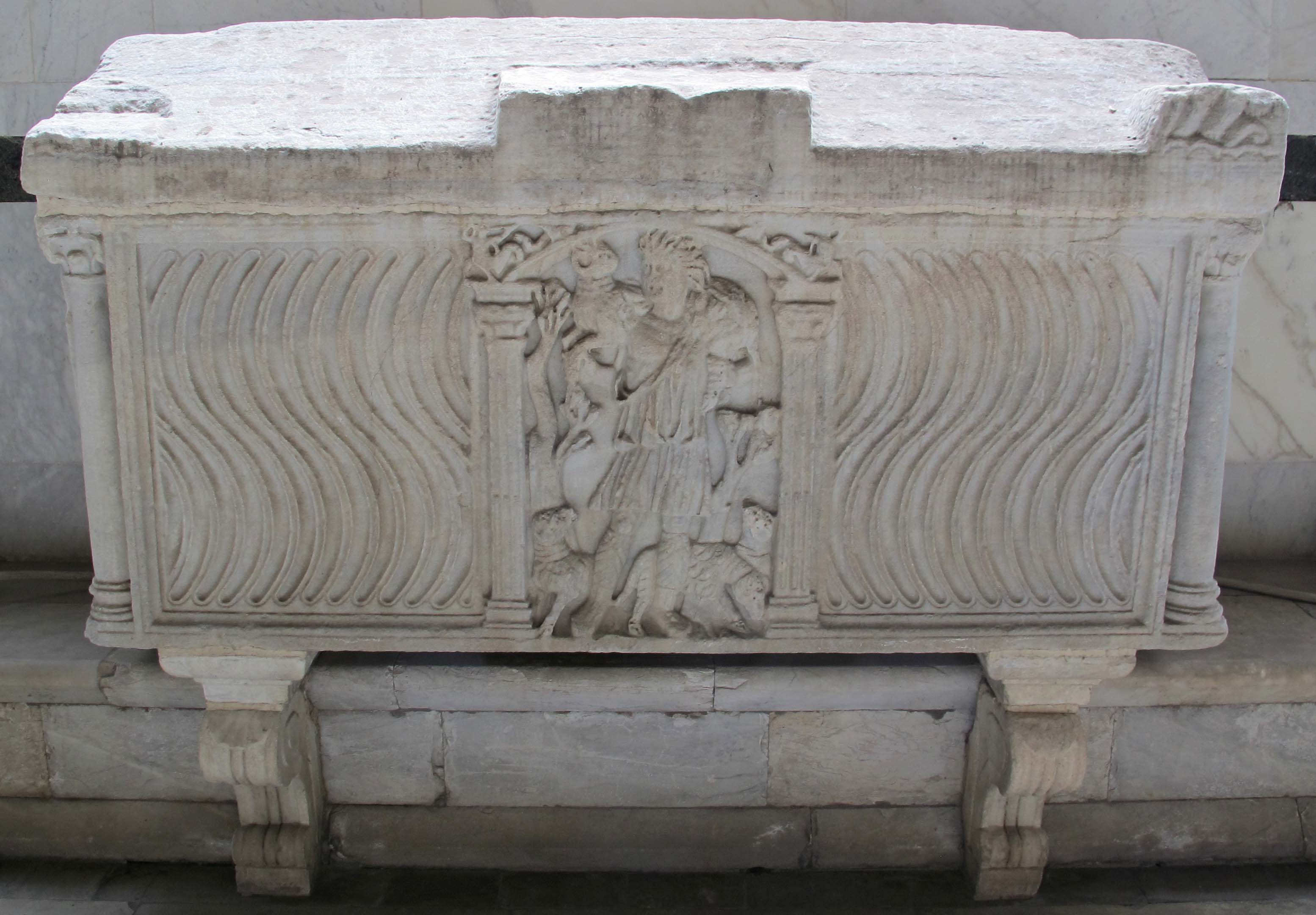 Sarcofago 58 strigilato del buon pastore